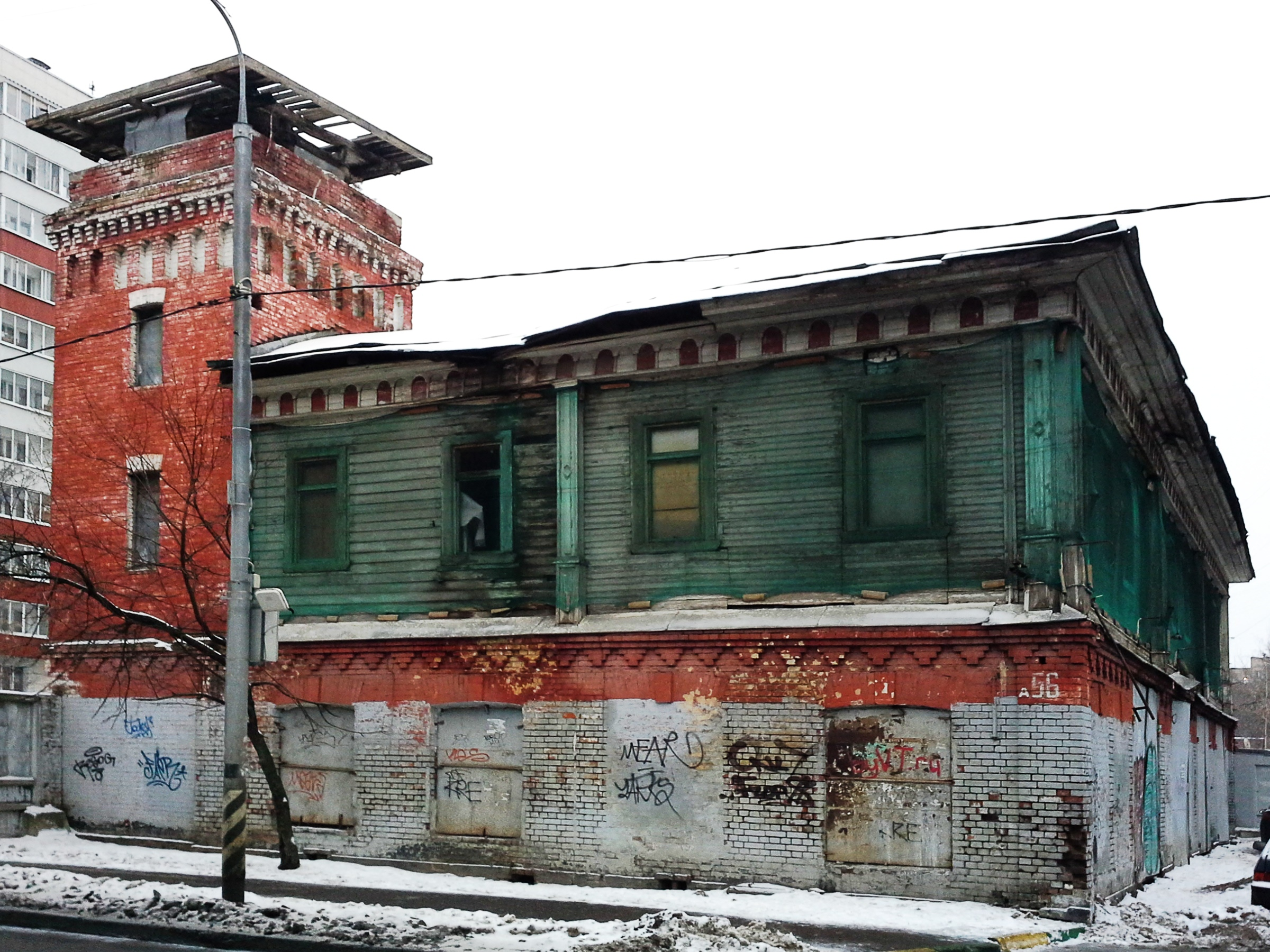 Москва, улица Хромова, дом 56 - б. Черкизовская пожарная часть. Построено в 1900-е под фабричный цех, в 1920-е перестроено под пожарную часть